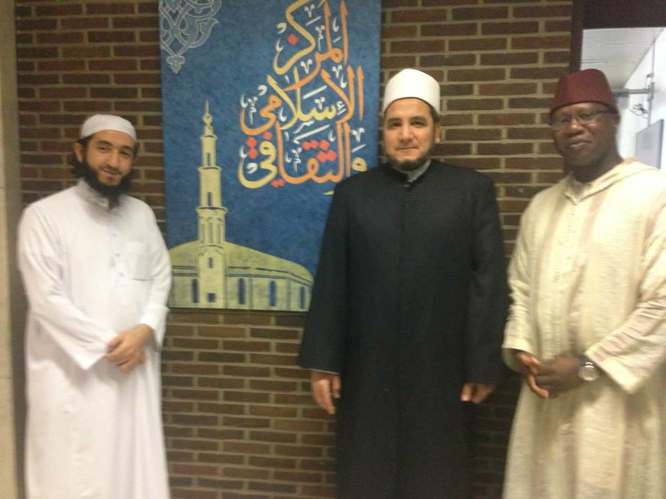 de gauche à droite : - Abdelkader Dahmichi (imam marocain) - Abdelhadi Sewif (imam égyptien) - Mouhameth Galaye Ndiaye (imam sénégalais) Ils étaient à cette époque les trois imams de la Grande Mosquée de Bruxelles. Photo prise à l'intérieur de la Grande Mosquée de Bruxelles en juin 2014.